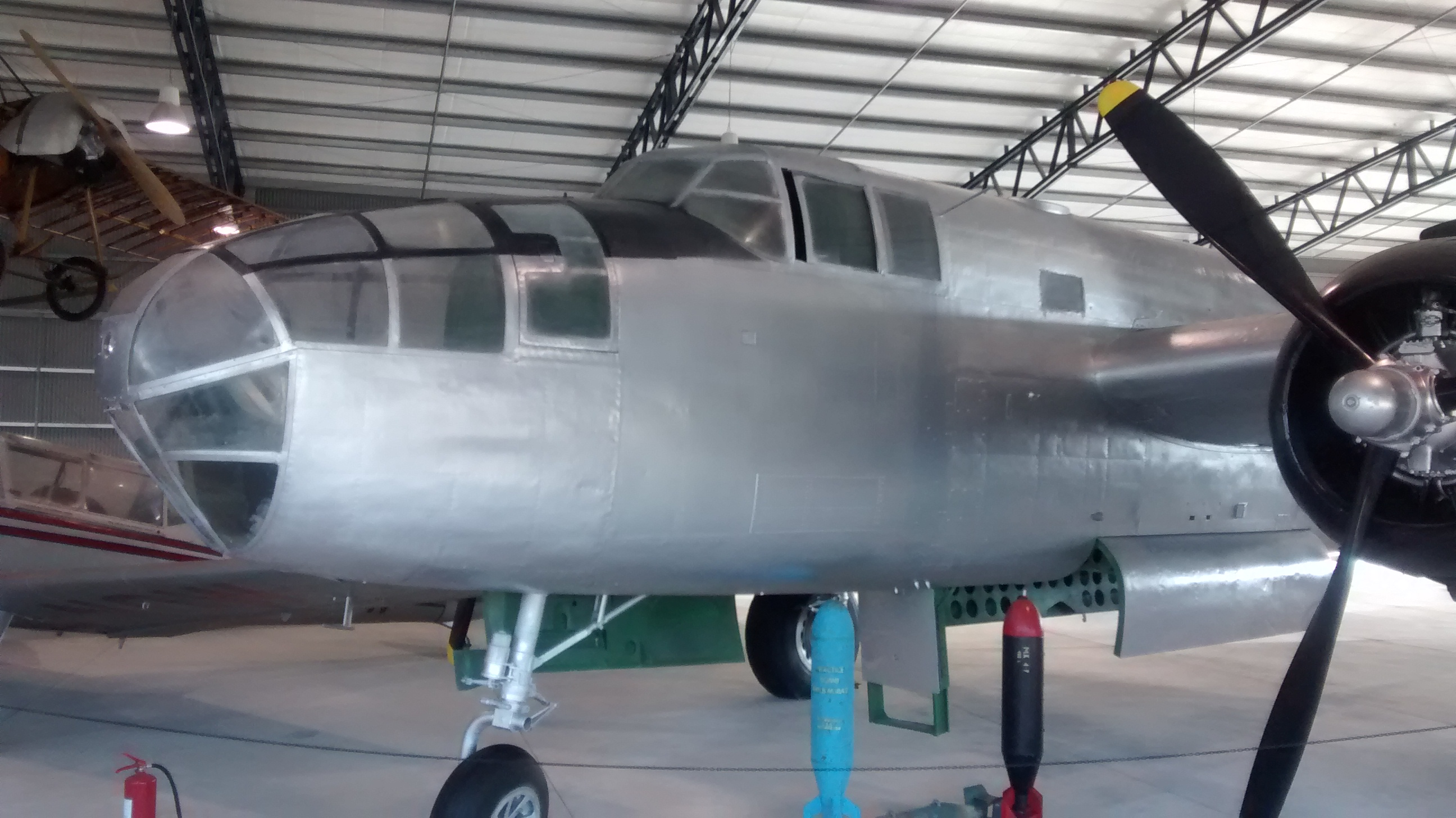 Charrúa 162